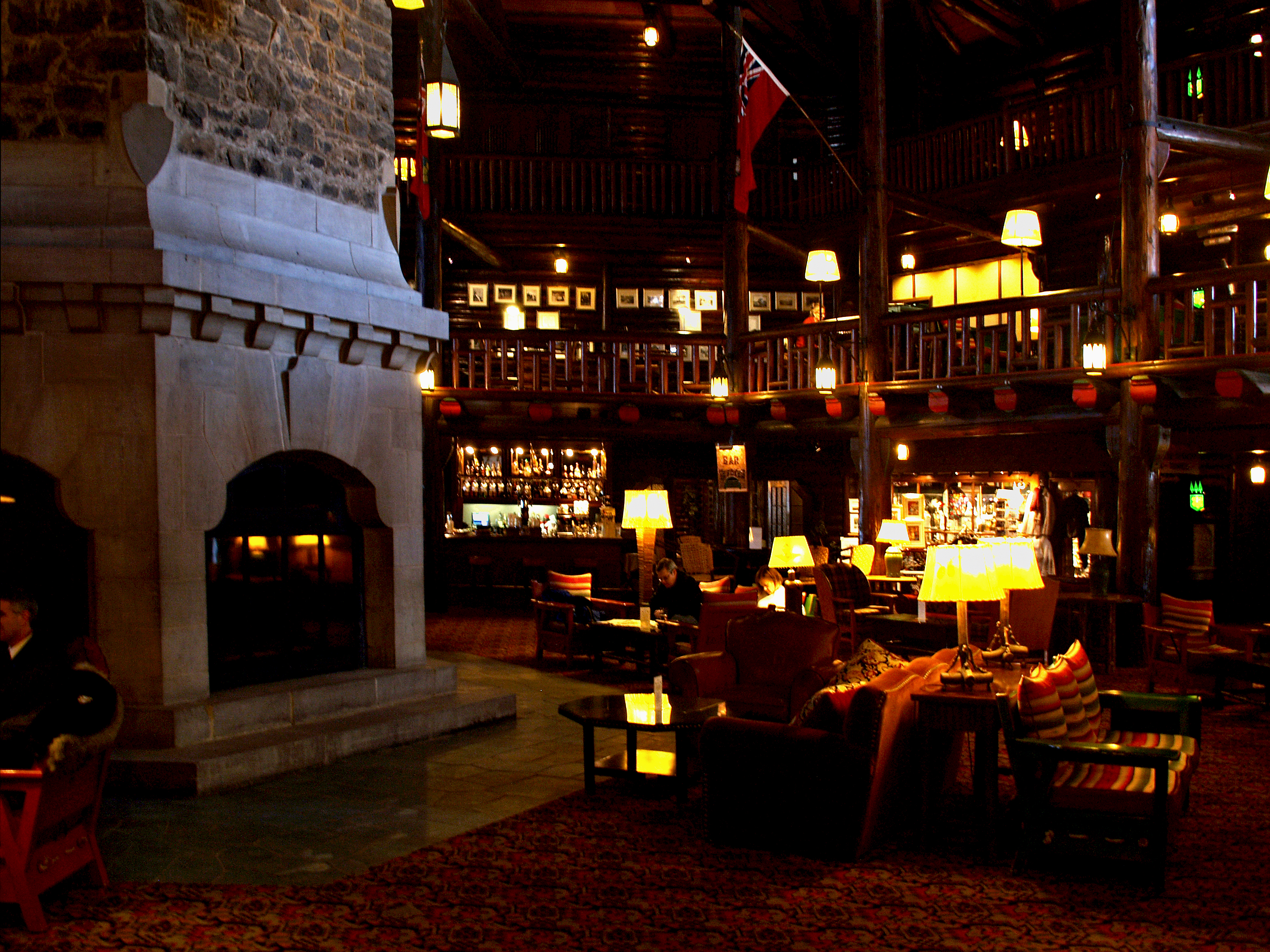 Montebello (Québec) - Intérieur du Château Montebello